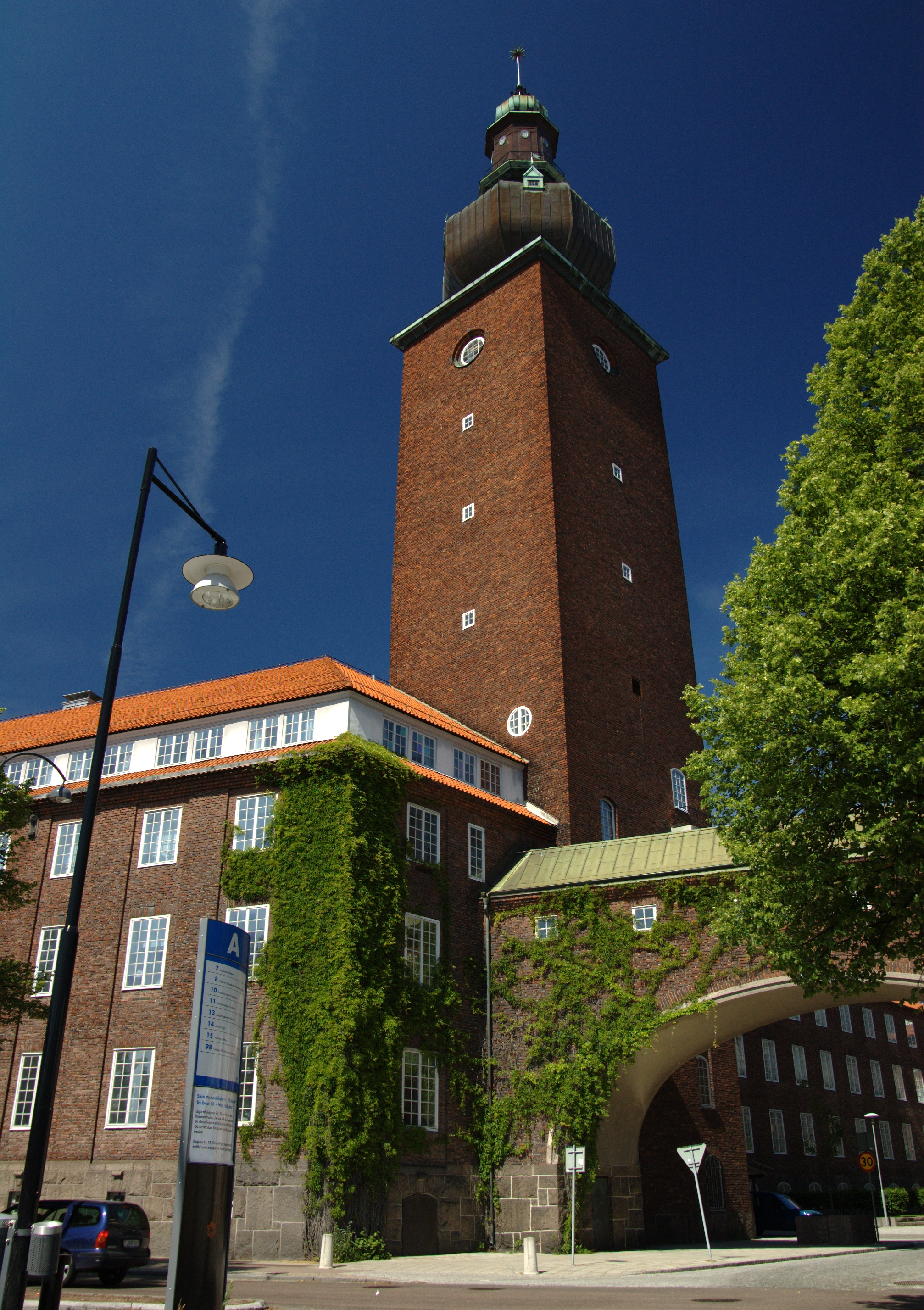 ABB headquarter Sweden, Västerås